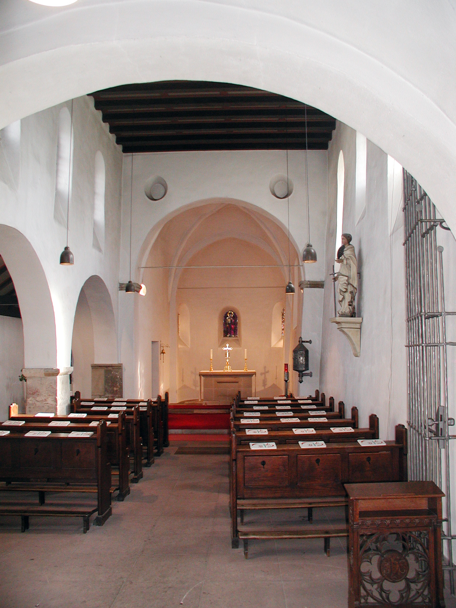 Köln-Lindenthal, Krieler Dömchen